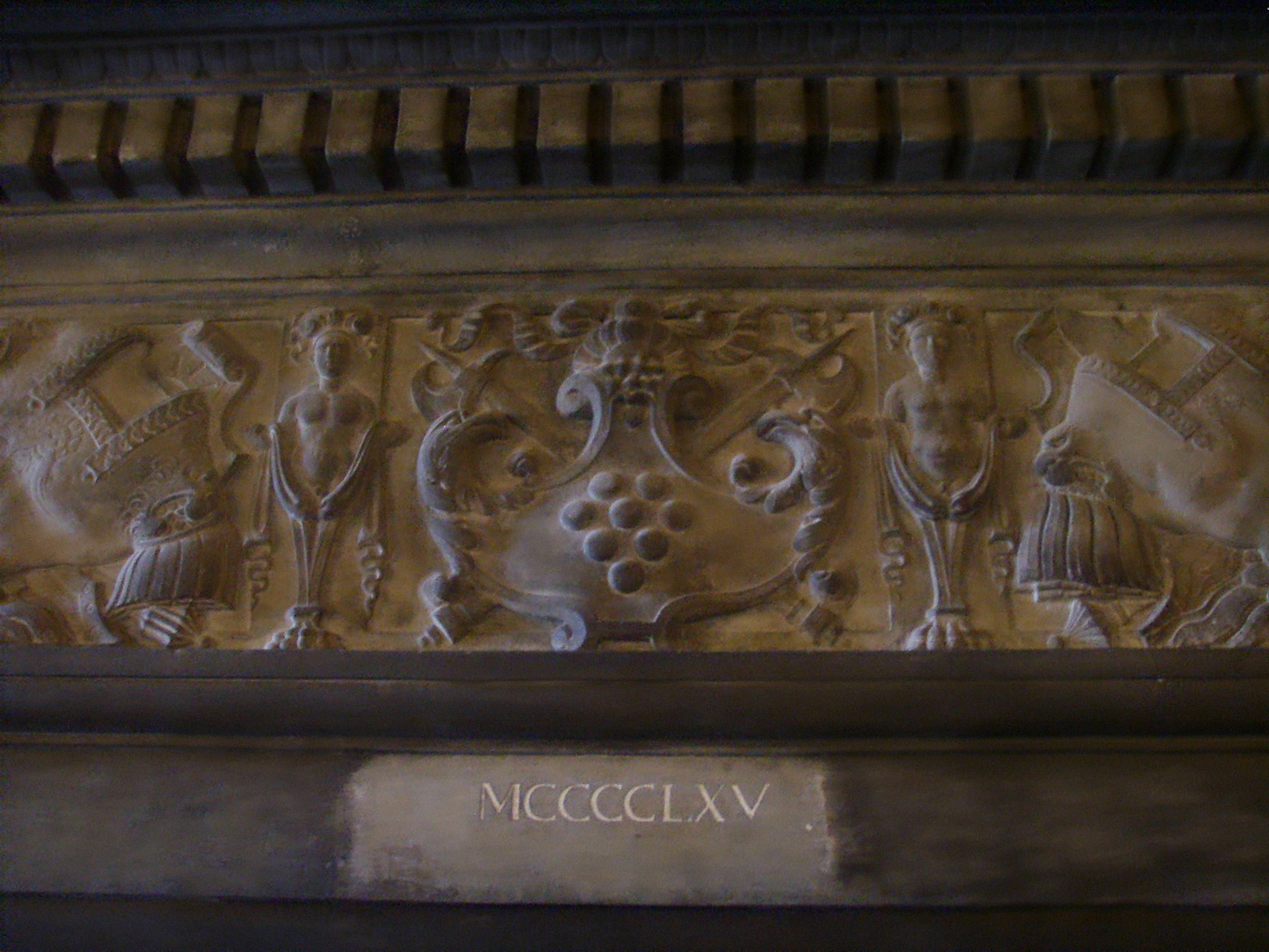 Villa di Careggi in Florence, Italy